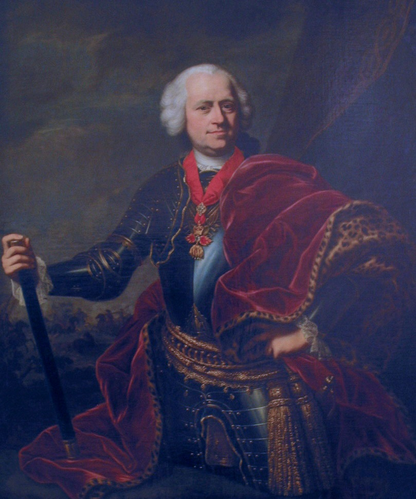 Porträt, darstellend Karl Josef Batthyány (1697-1772)